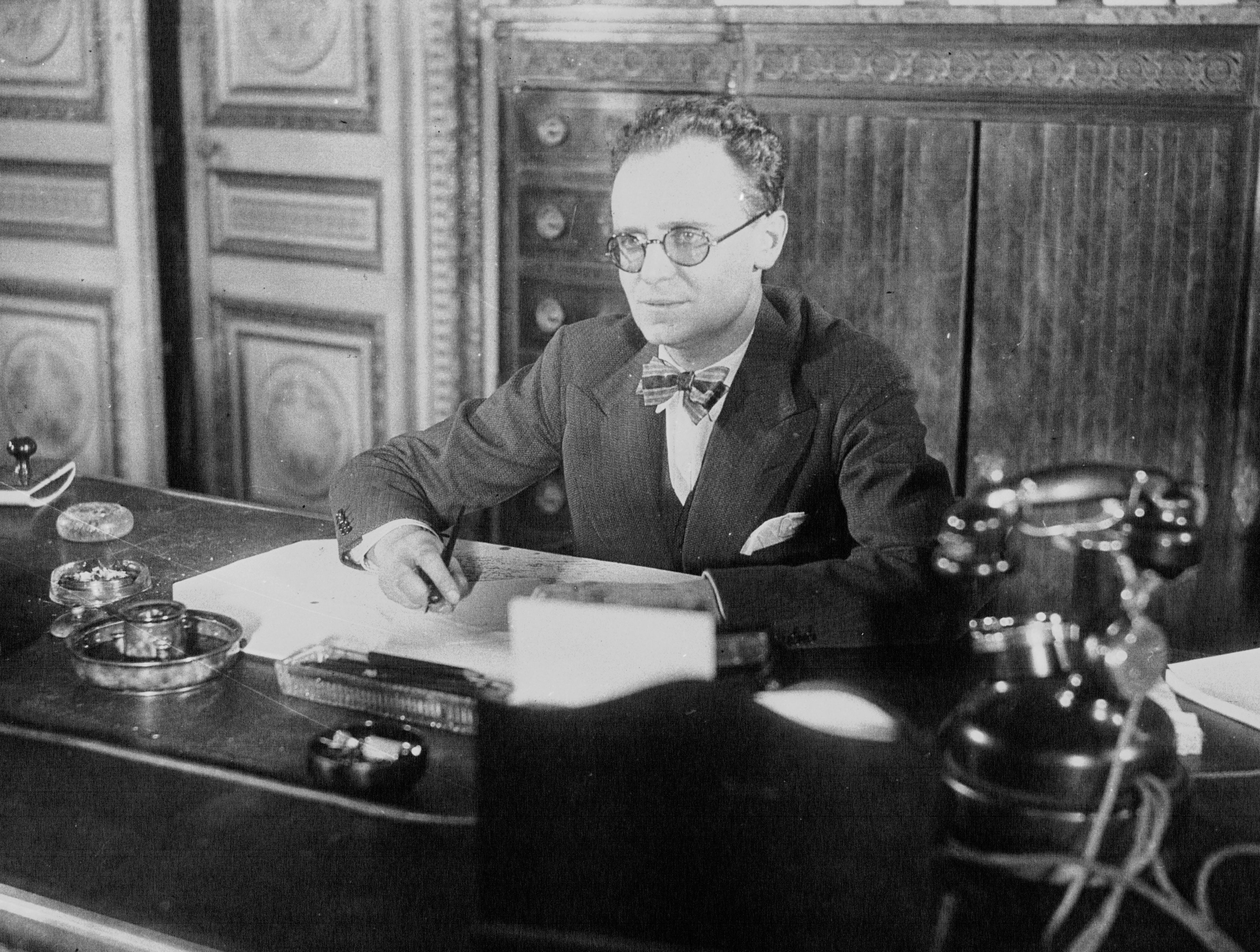 Pierre Cot, ministre de l'Air, à son bureau : photographie de presse